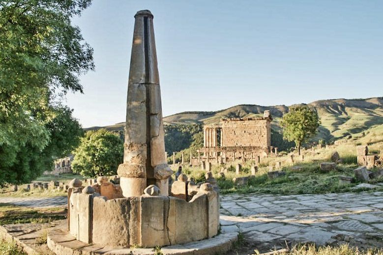 Djémila